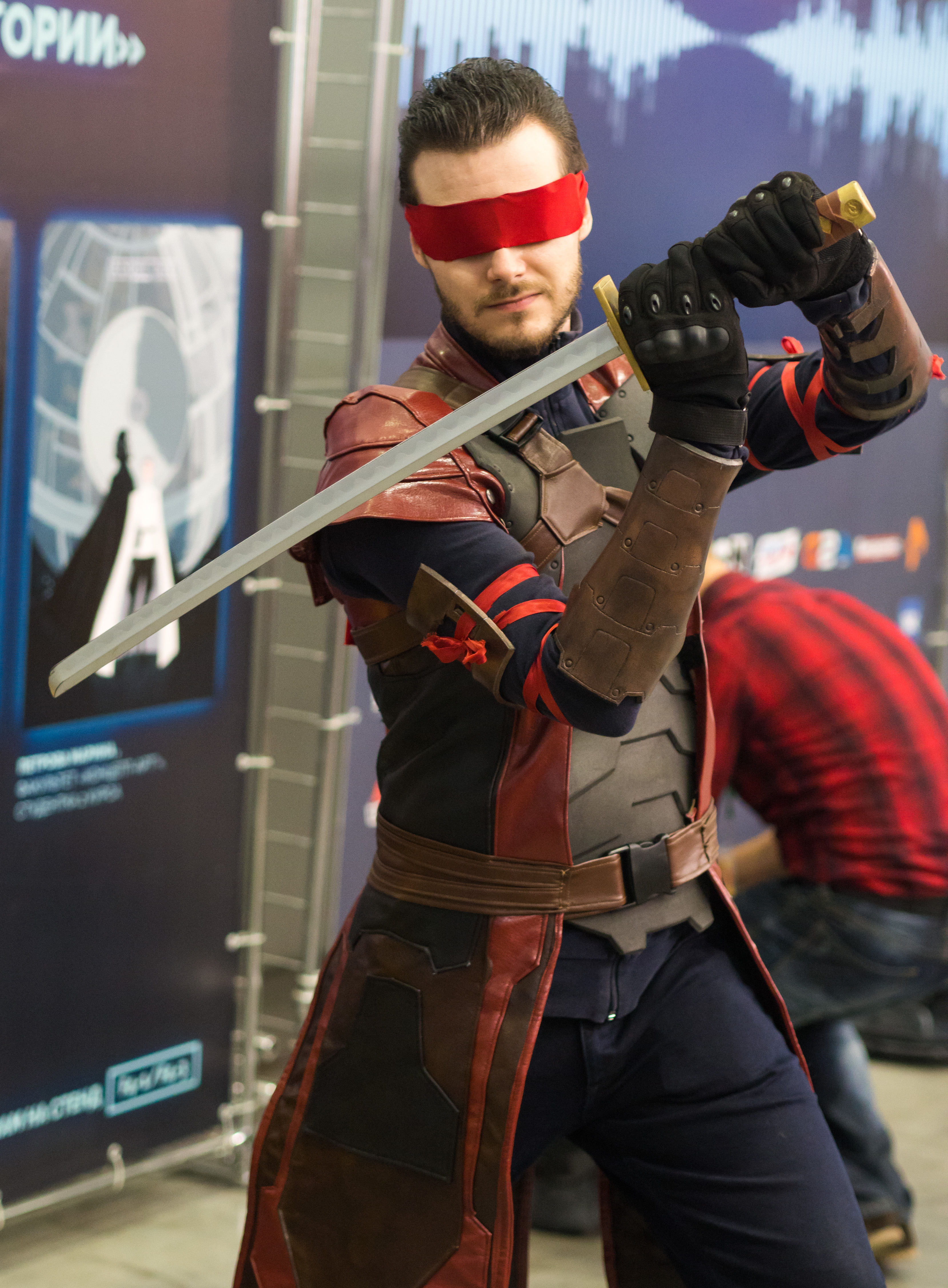 day 4